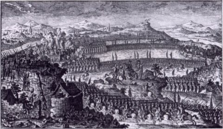 Битка при Лобозиц